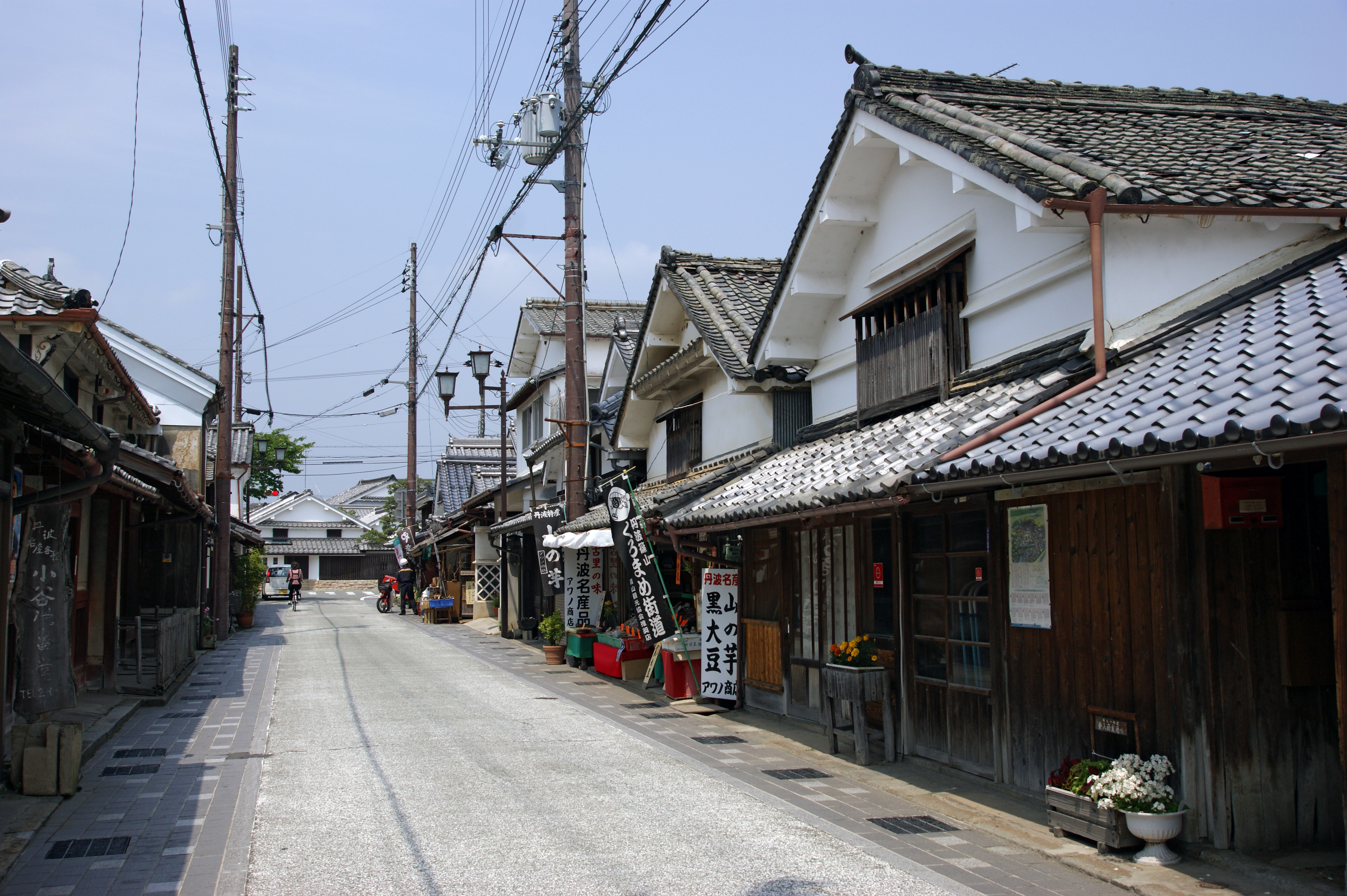 Kwara-machi in Sasayama, Hyogo prefecture, Japan